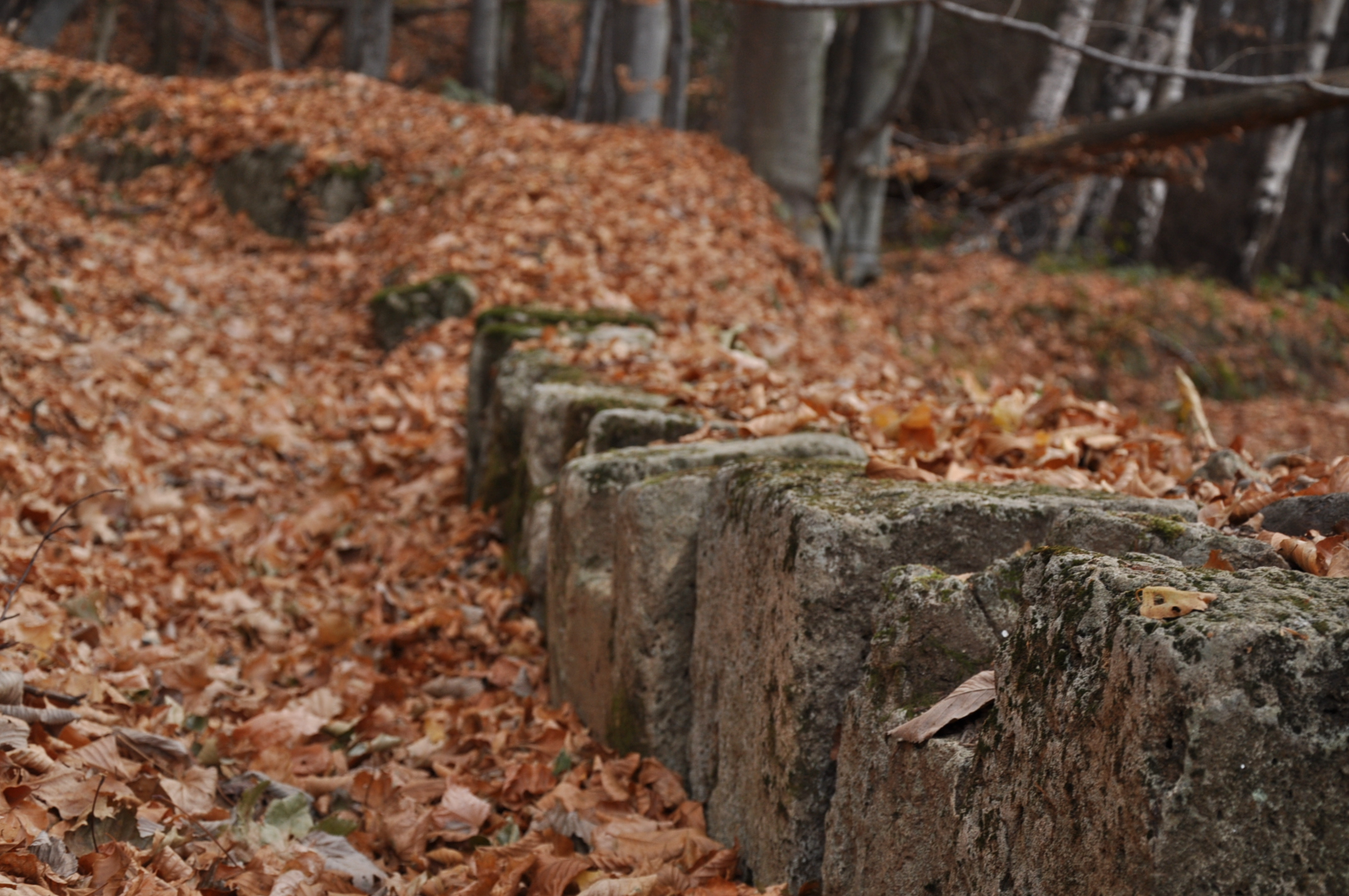 Situl arheologic de la Grădișteade Munte, punct "Masivul Fețele Albe"